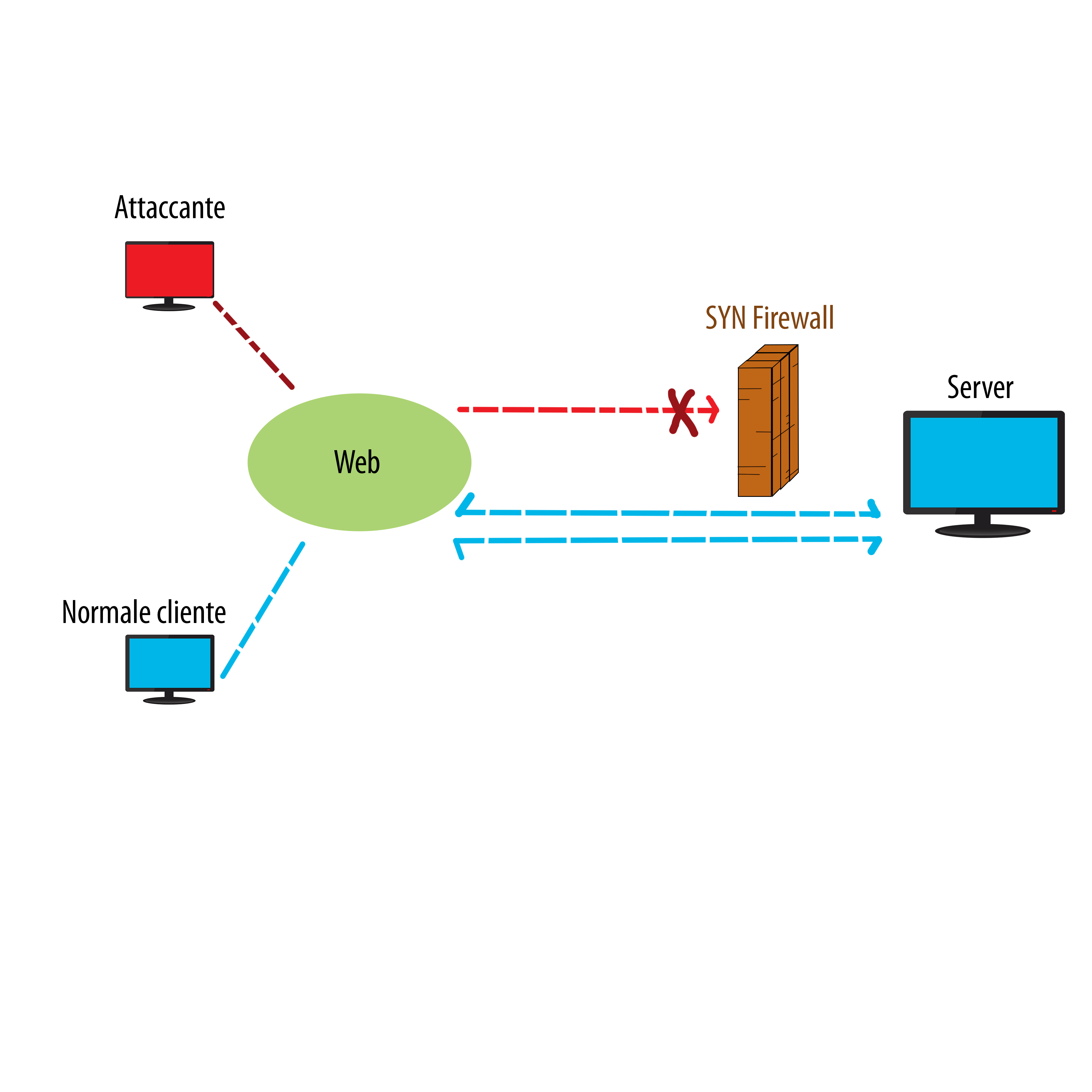 Uso dei SYN Cookies per difendersi da SYN flooding.